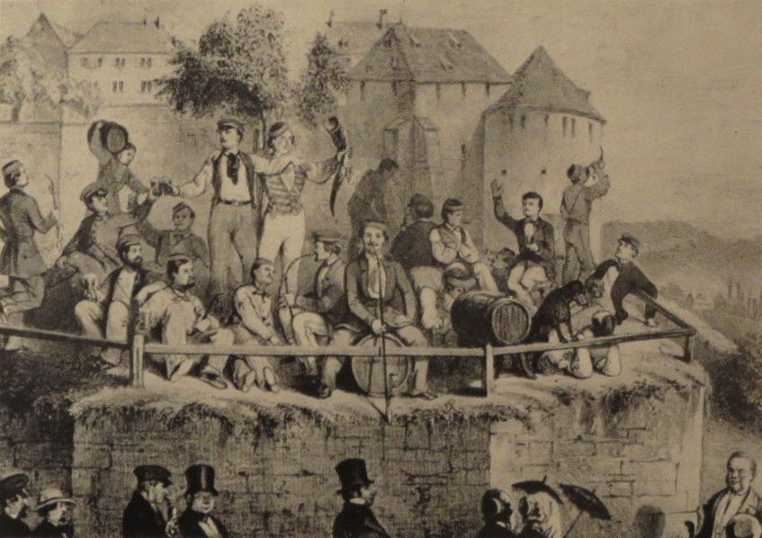 Kneiperei auf dem Schänzle am Schloss Hohentübingen. Lithographie